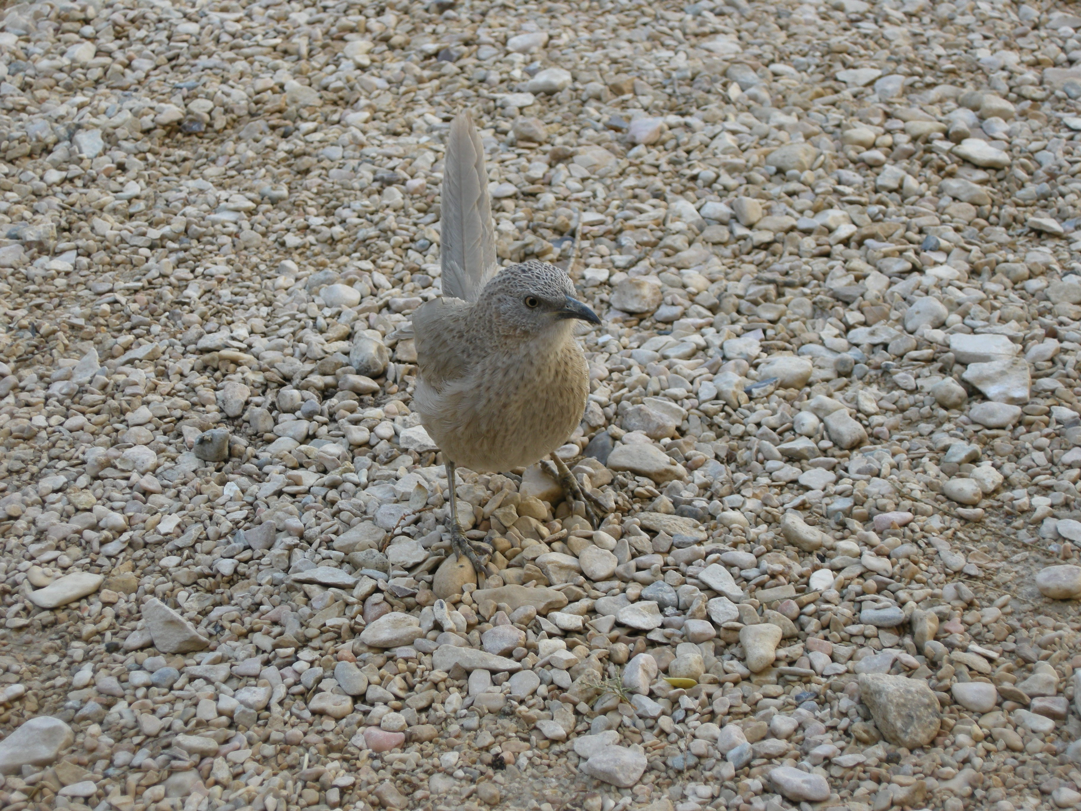 Turdoides squamiceps